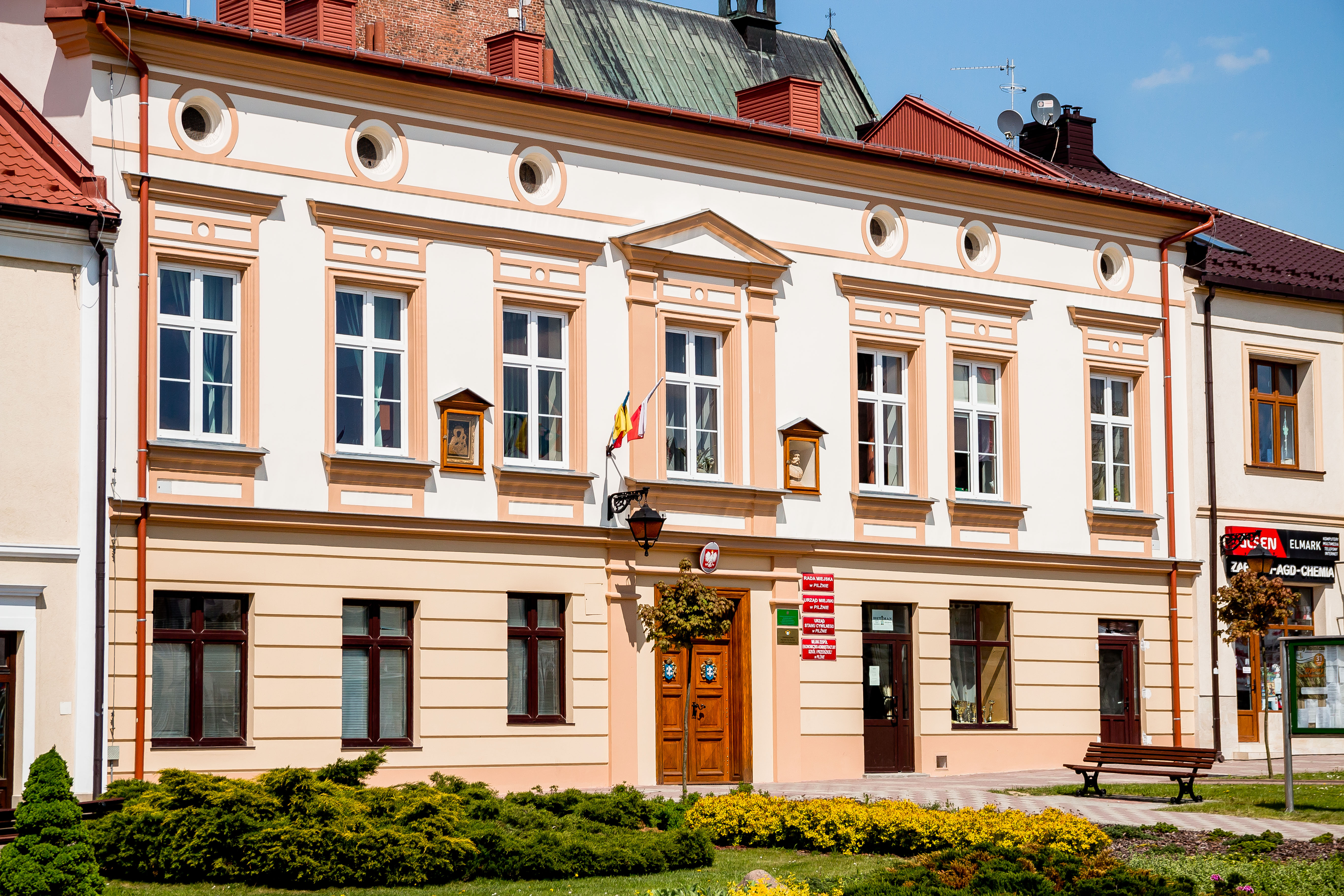 Budynek Urzędu Miasta i Gminy Pilzno, odnowiony w 2014 roku.